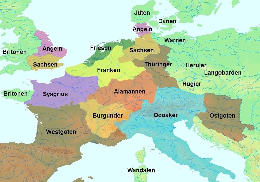 Zentraleuropa Ende des 5. Jahrhunderts